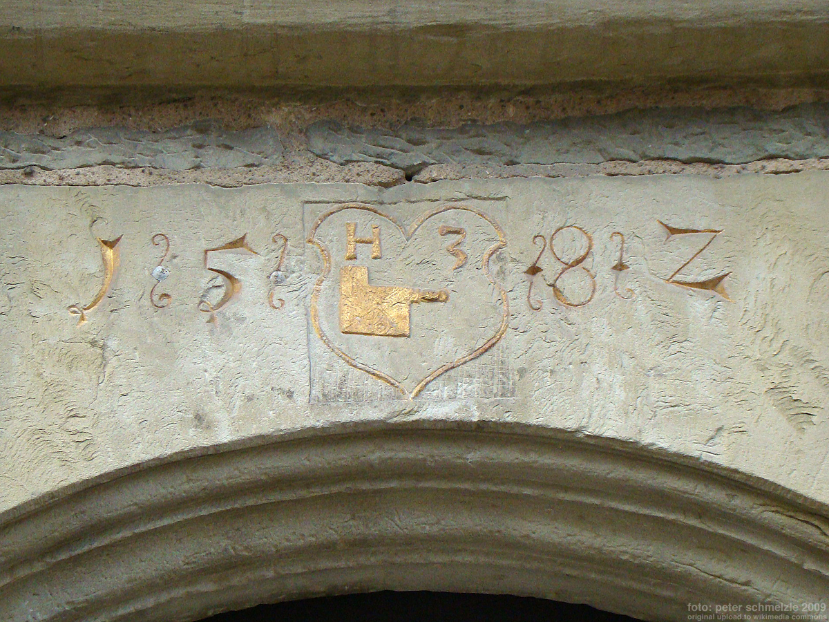 Portalinschrift des Baumannschen Hauses in Eppingen